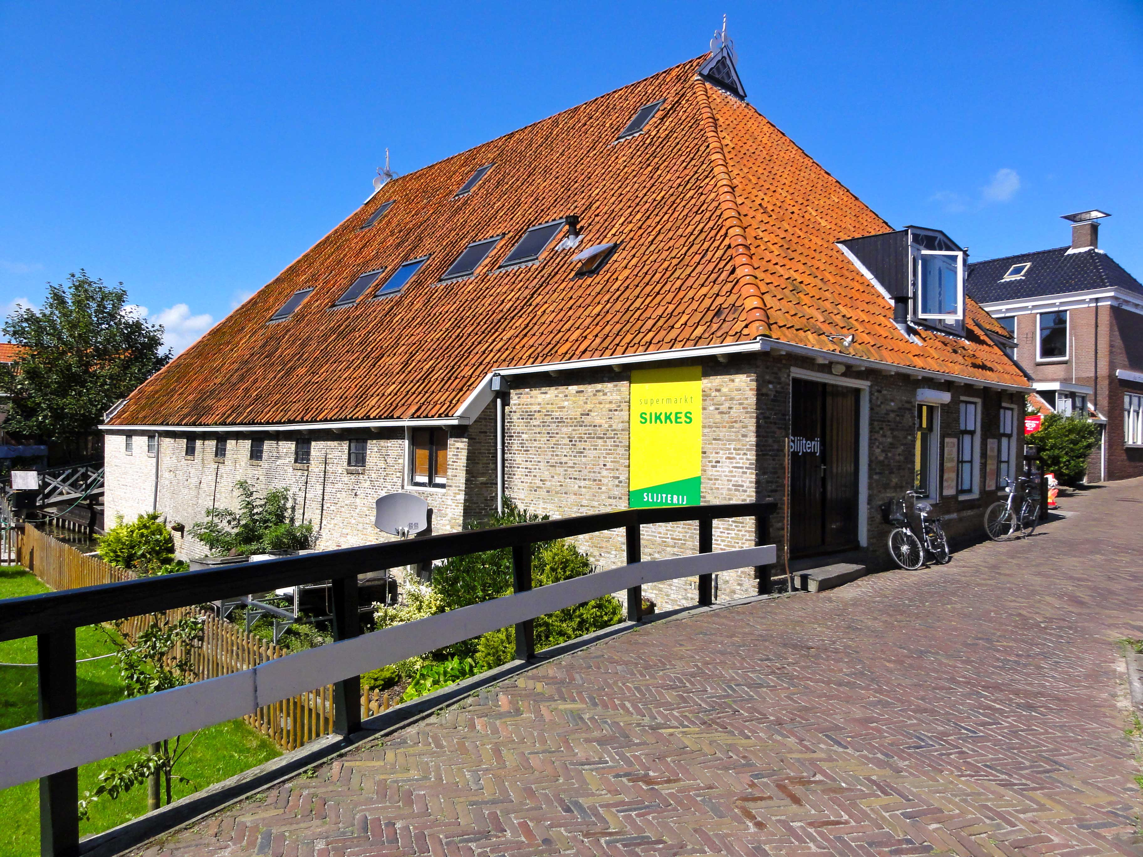 Tuinen 31 te Hindeloopen